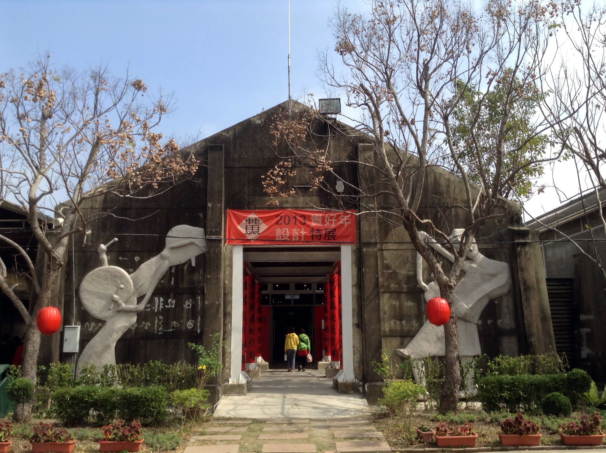 2013 貴好年